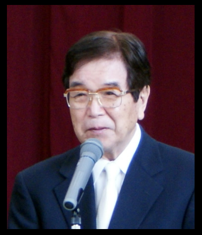 学校法人光の村学園・社会福祉法人光の村を創立し、各地に卒業生のための施設を開いた